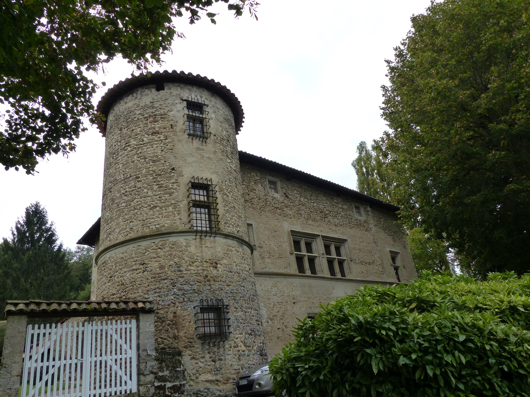 Château de Quincivet (Saint Vérand), maison forte du XVe siècle